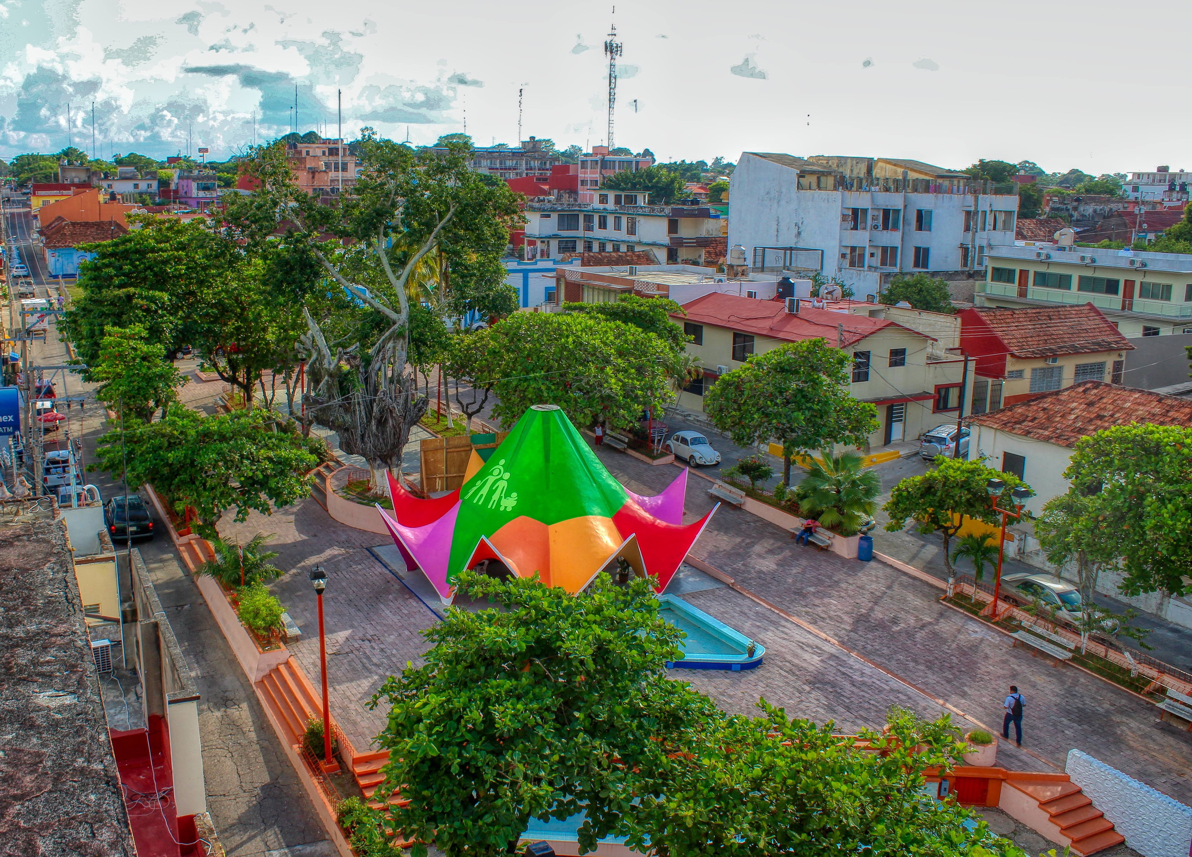 Parque Indepencencia, se encuentra ubicado frente al Ayuntamiento de Emiliano Zapata. Y el Kiosko, obra realizada por el Arq. Ventura Marín Azcuaga